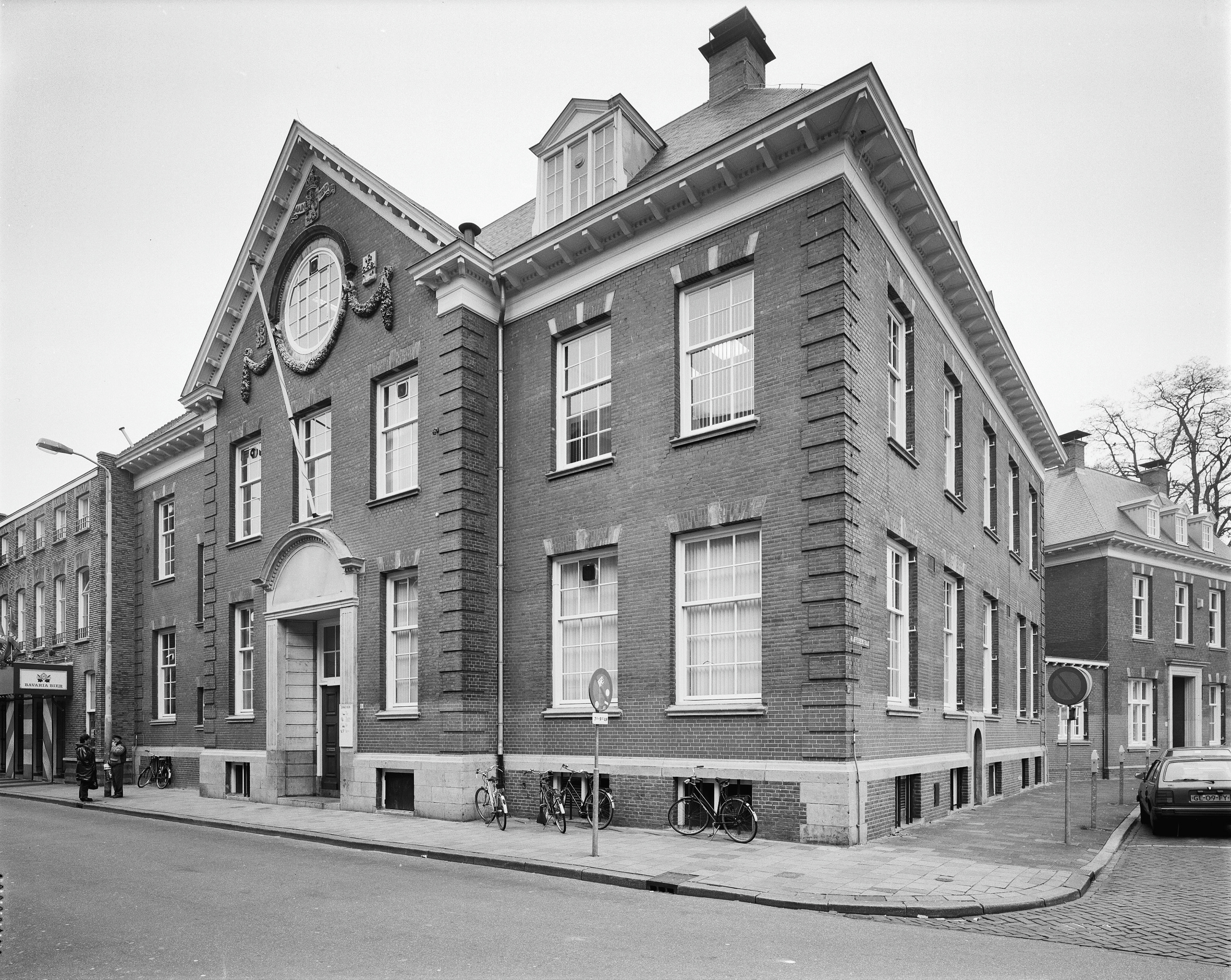 Complex Dommelstraat/Raiffeis. str.: Exterieur VOORGEVEL, RECHTER ZIJGEVEL